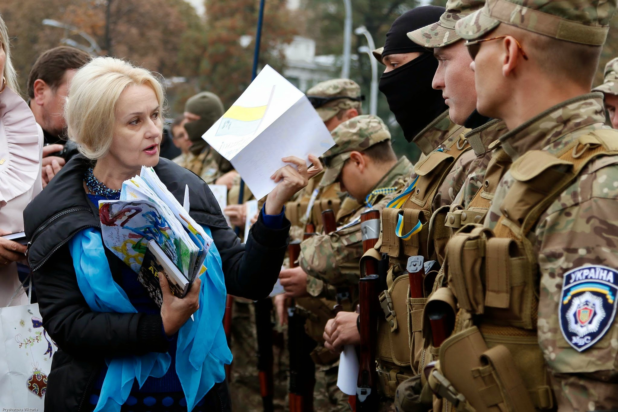 «Сичь» II группа отправляется на восток